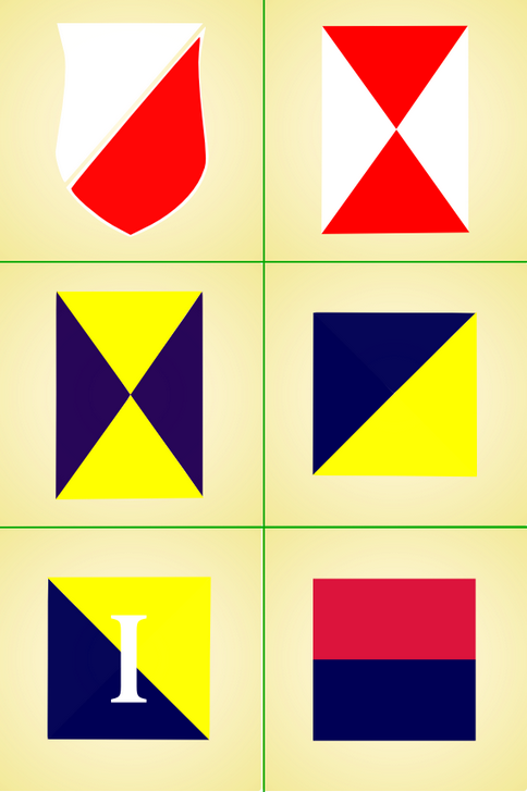 Oznakowanie pojazdów w Brygadzie Strzelców Karpackich Polskich Sił Zbrojnych na Zachodzie - Syria pojazdy dowództwa - tarcza herbowa podzielona skośnie na białe i czerwone pole i prostokąt podzielony przekątnymi tworzącymi cztery trójkąty - górny i dolny czerwone, boczne białe Pułki piechoty miały takie same znaki, lecz o barwach broni. Trójkąt górny i dolny był żółty, a boczne granatowe. Stosowano też znak w kształcie kwadratu podzielonego wzdłuż przekątnej tworzącego dwa trójkąty, górny (lewy) granatowy, dolny żółty oraz o barwach odwróconych z numerem batalionu oznaczonym białą rzymską cyfrą. Dywizjon Ułanów Karpackich miał znak w formie kwadratu podzielonego poziomo o barwach: górnej karmazynowej, dolnej jasnogranatowej. Znak 2 szwadronu: górna biała, dolna pąsowa.